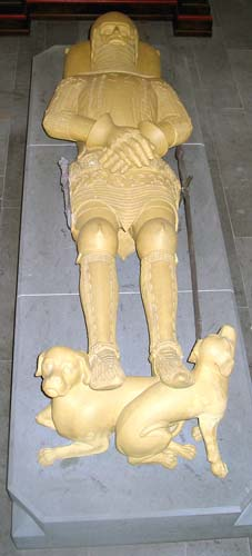 Kopie des Grabmals von Graf Gottfried IV. in der St. Johannes Kirche Arnsberg Neheim. Das Original befindet sich im Kölner Dom